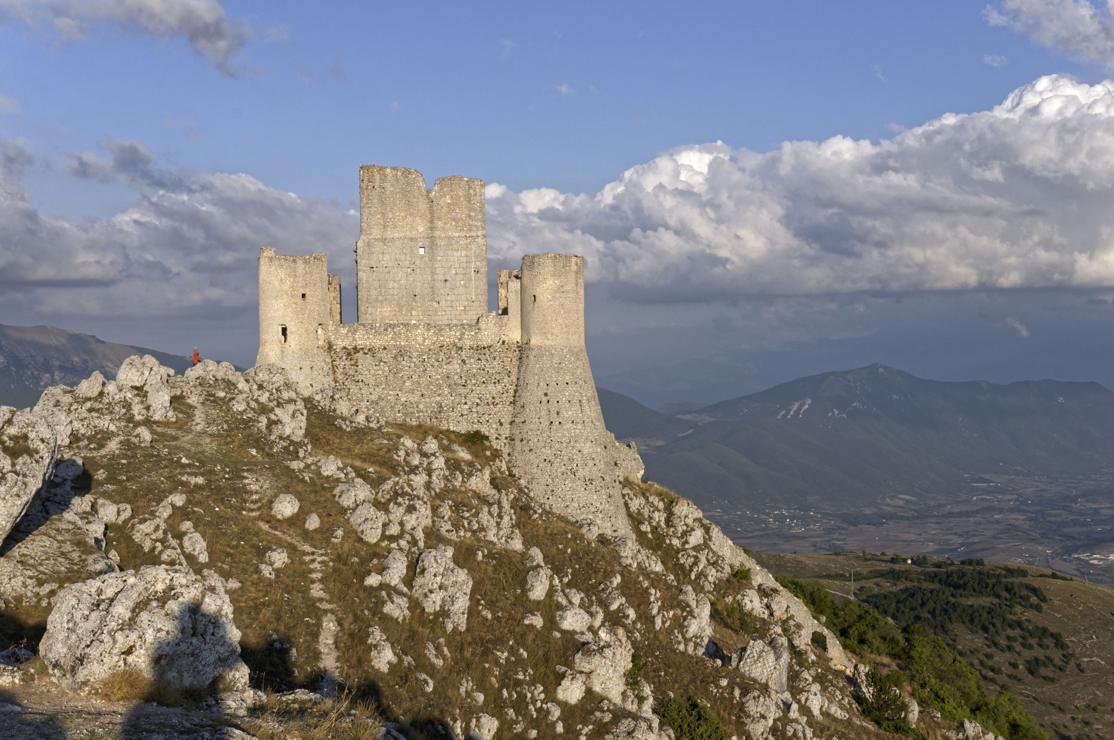 Castello di Rocca Calascio 2015